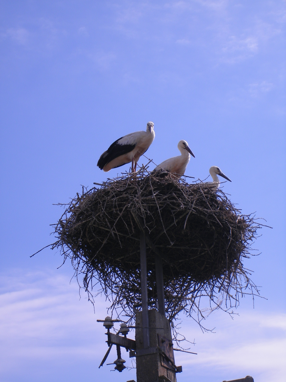 Kocs - gólyafészek a katolikus templom mellett